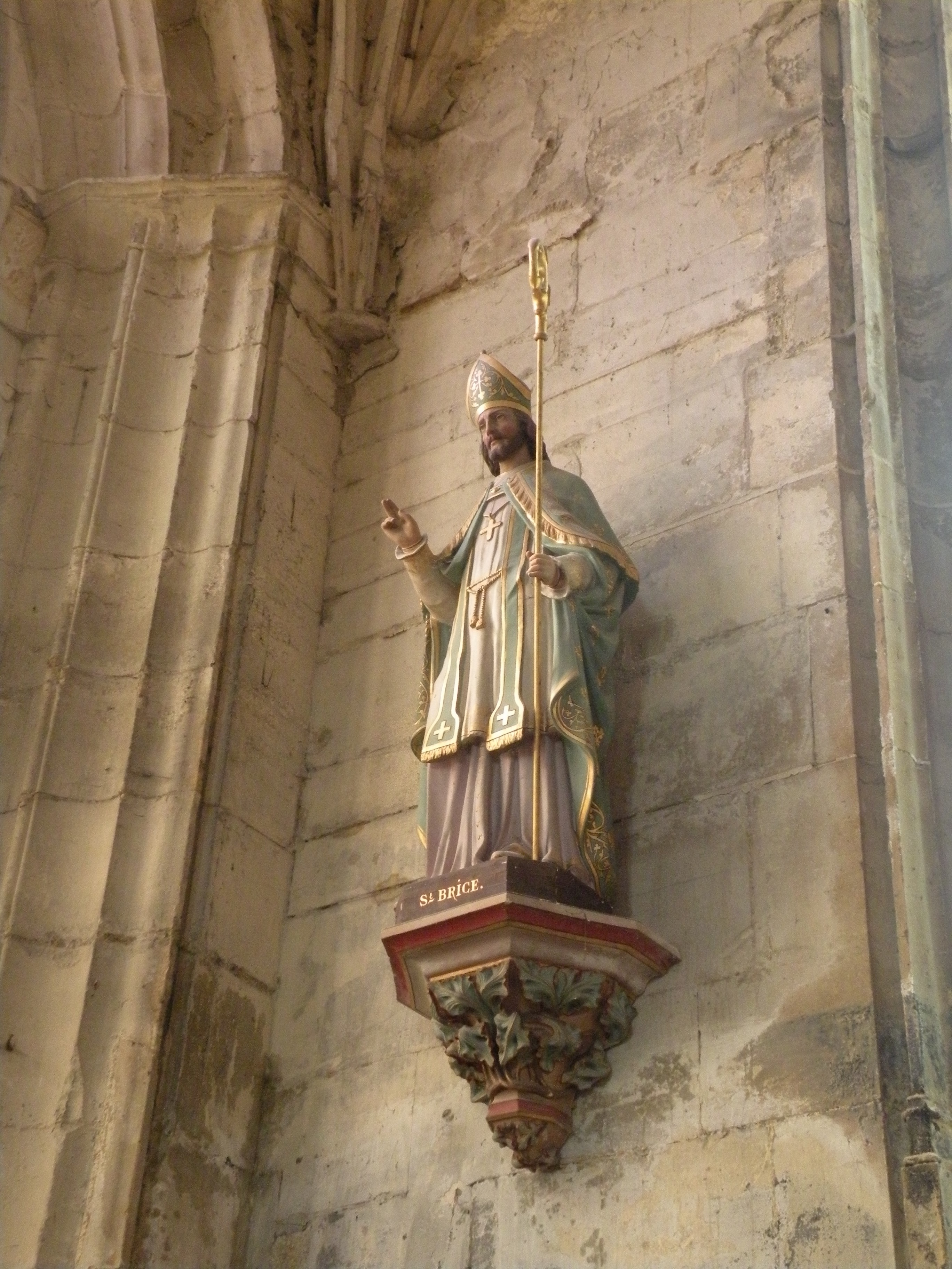 Église de Chaumont-en-Vexin statue